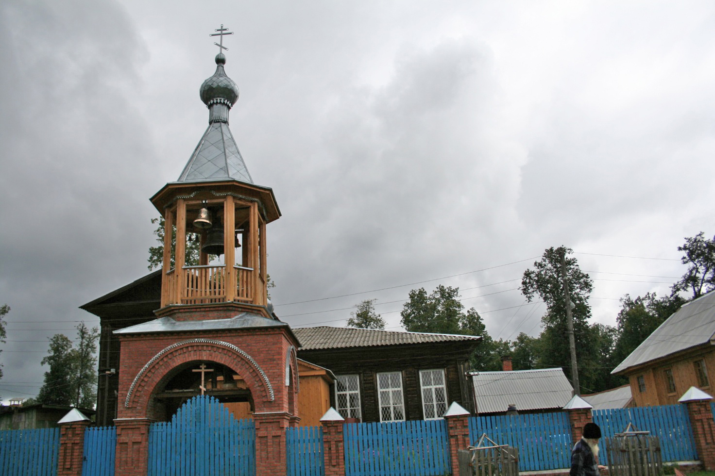 Ӓв ӹ сирӹштӹ тенгеок Кырык Мары Шур монастир ылын. Тӹдӹм 1867-шӹ ин пачмы, а чангашыжы кырык марынвлӓ ӹшке оксам погенӹт . 1920-шы ивлӓн монастирӹм питӹрӹмӹ дӓ 2006-шы ин угӹц пачмы.